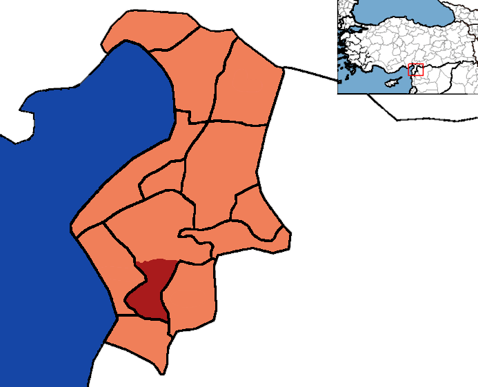 Hatay ilçeler haritası.